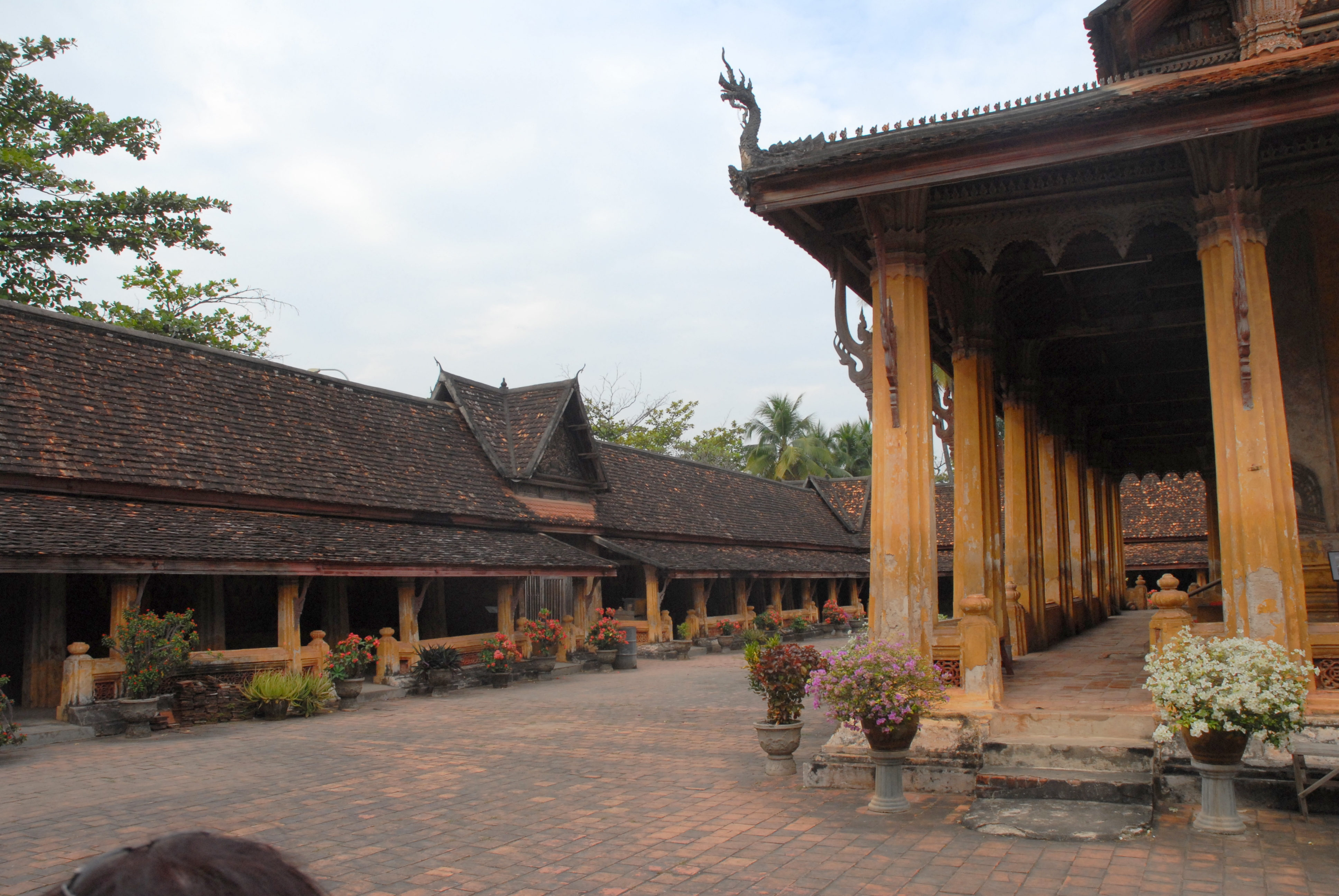 Pagode Vat Sisakhet à Vientiane : galerie du cloître